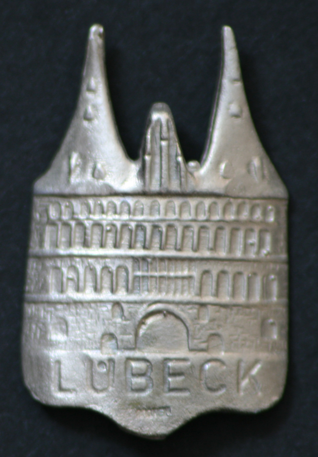 Emblem der Amrein handmade Serie, das Holstentor aus Silber